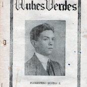 Imagen de la portada de la revista Nubes Verdes, Ipiales, 1924.